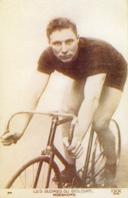 Piet Moeskops. Reclamefoto DIX; meer dan 70 jaar oud.